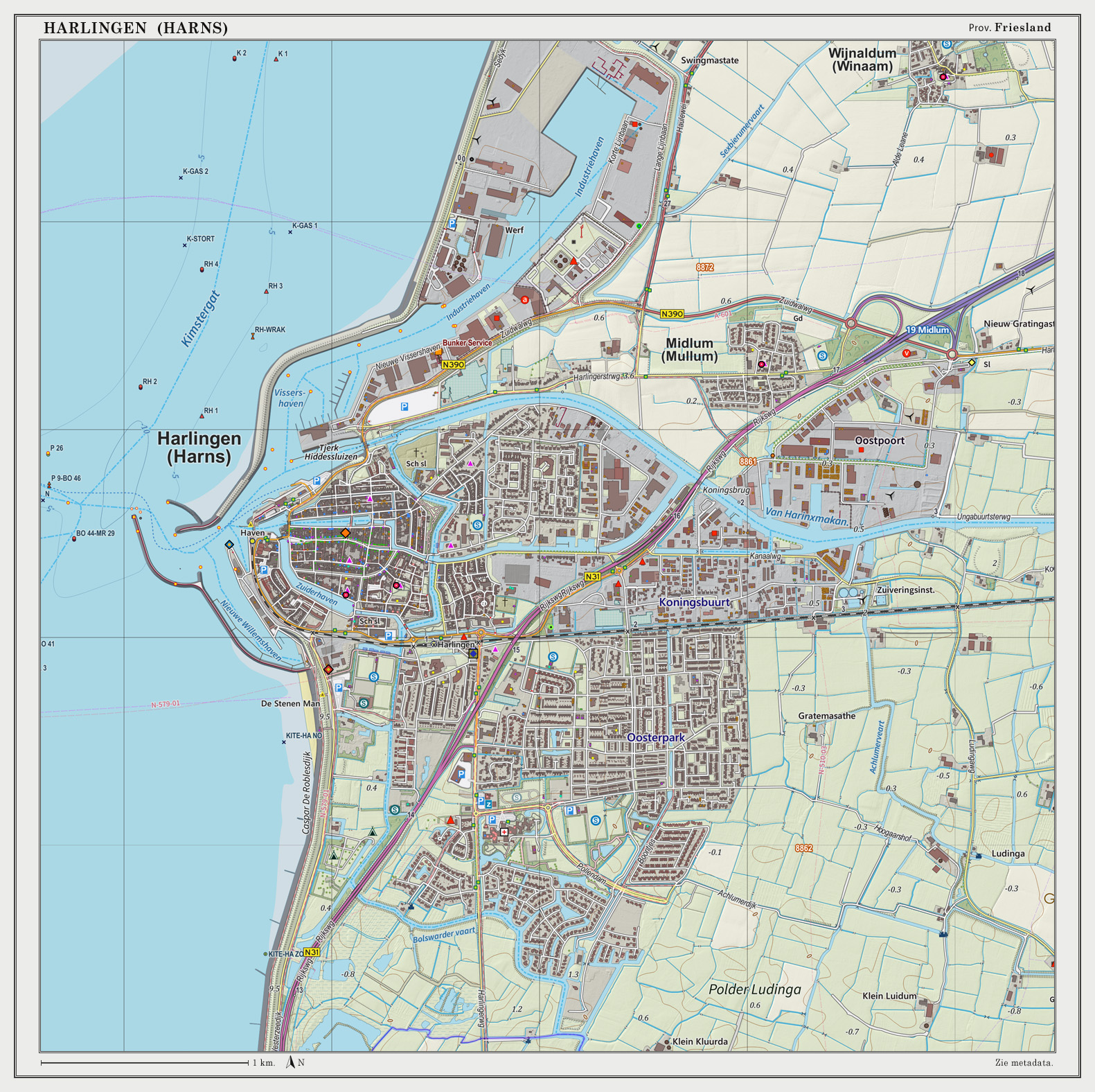 Topografische kaart van Harlingen (woonplaats). Resolutie: Resolutie: 300 pixels/km. Kaartbeeld samengesteld uit de open geodata van de Top10NL en Top25namen (Basisregistratie Topografie, Kadaster), Creative Commons BY licentie. Gebouwvlakken uit open geodata BAG extract. Wegen uit de OpenStreetMap, OpenStreetMap community. Schaduwreliëf uit de Actuele Hoogtekaart AHN2. Samenstelling en kleurenschema: Jan-Willem van Aalst, met QGIS2. Zie ook de Legenda.